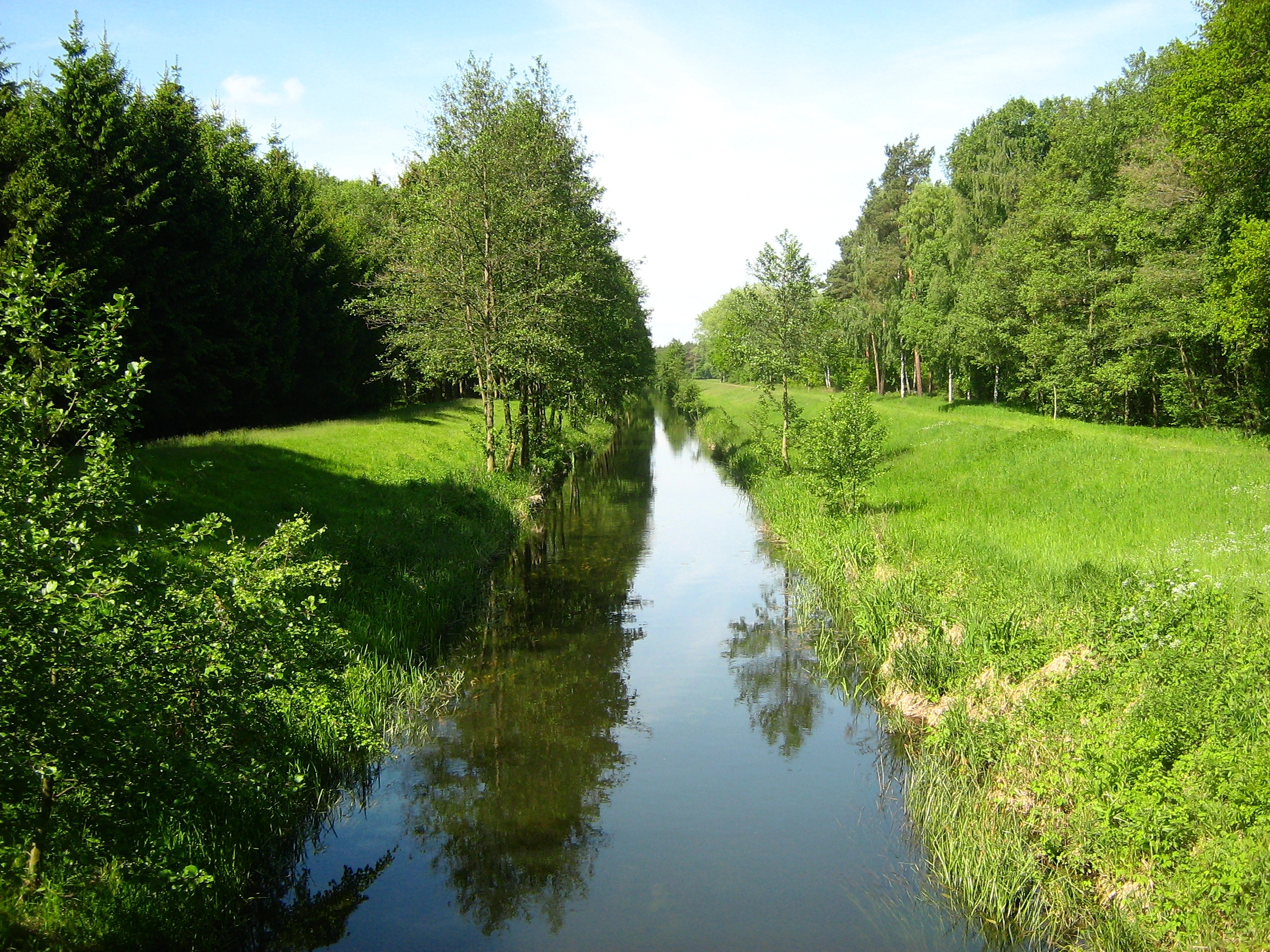 Die Neue Jäglitz bei Waldfrieden (Havelberg).